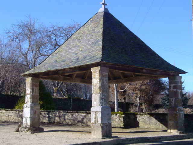 L'oradour permettait à l'époque, aux prêtres, de dire la messe et lire les prières pendant que les curés travaillaient la terre.